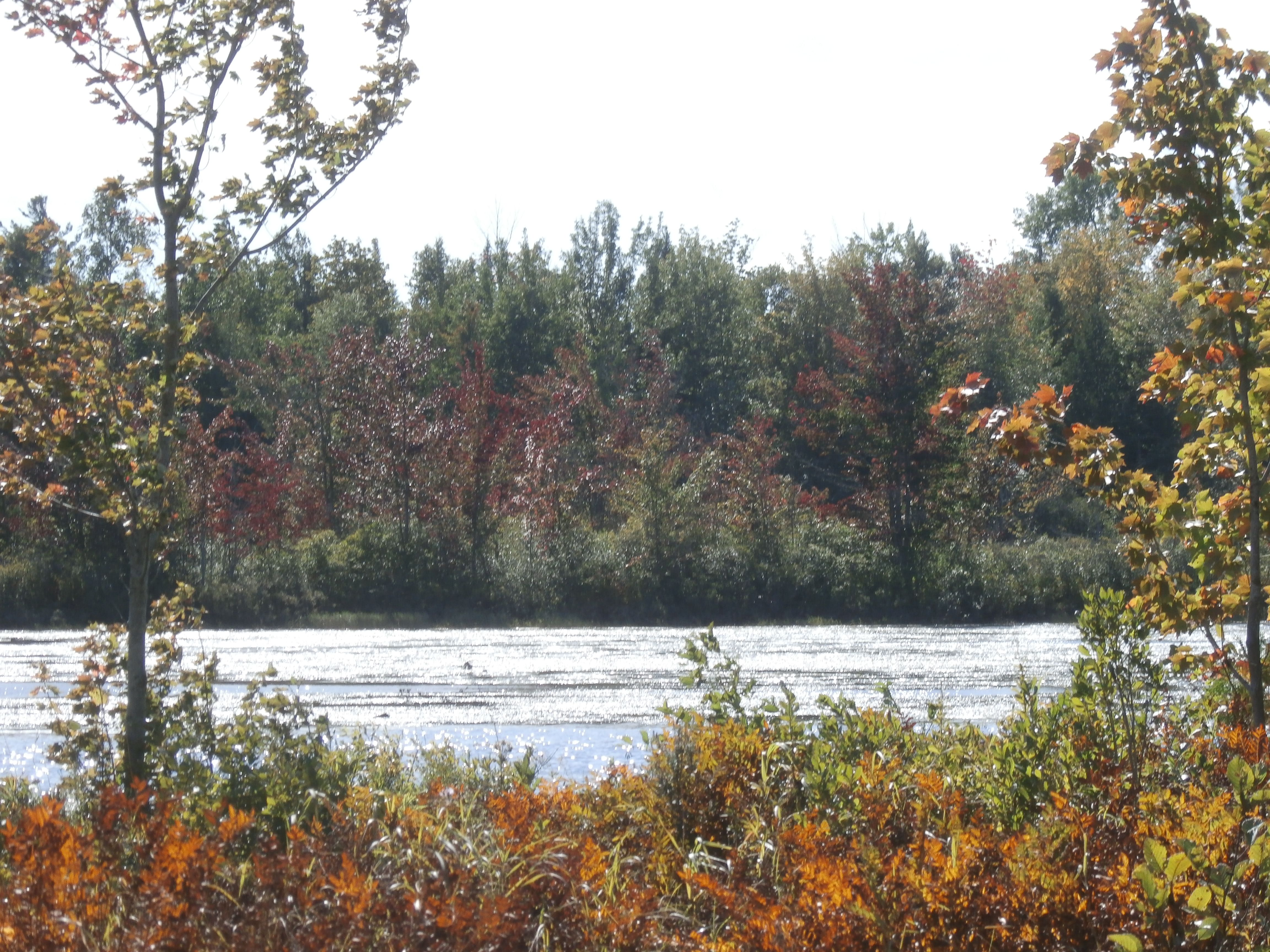 Marais Maskinongé adjacent au lac Aylmer près de la municipalité de Stratford.